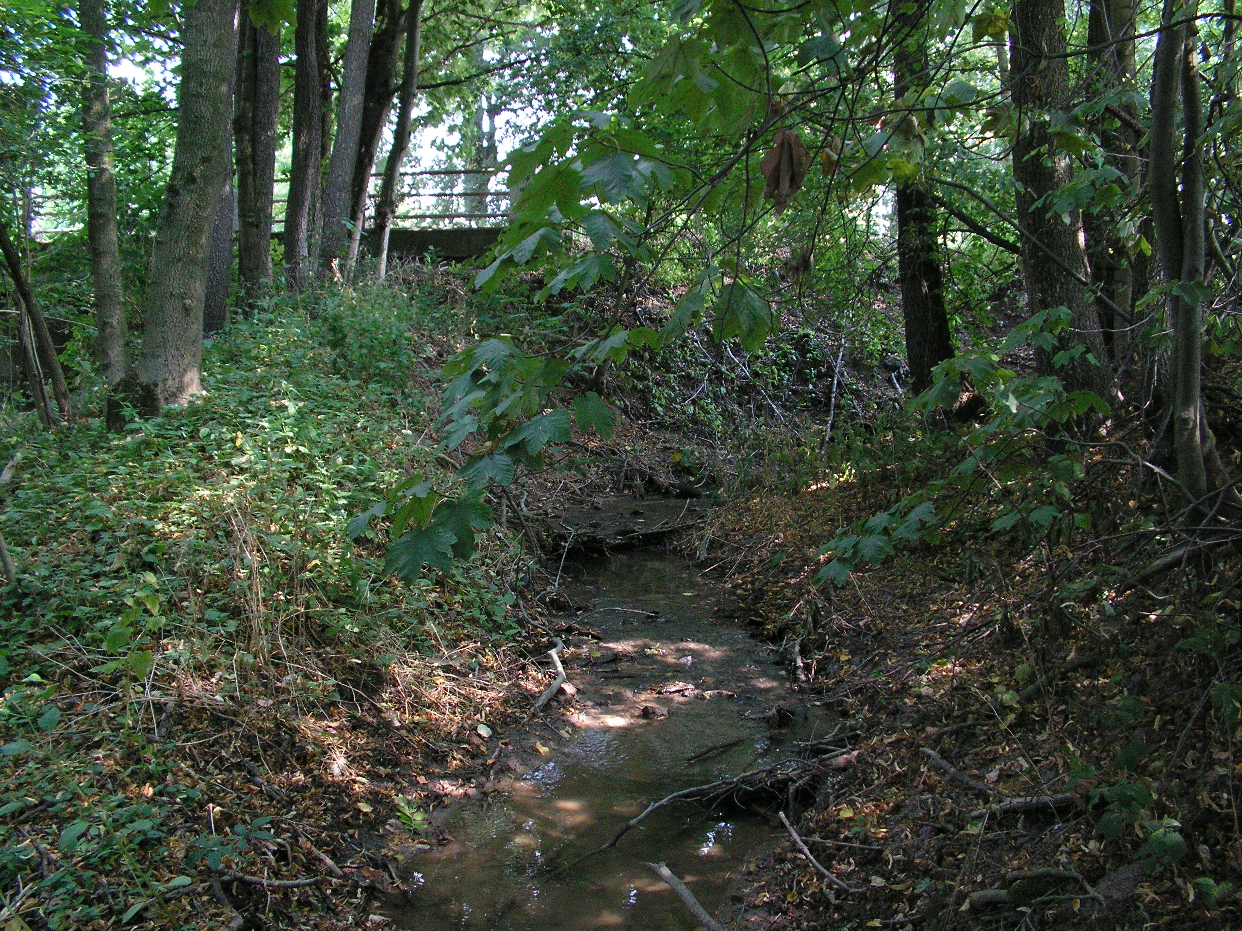 Morašický potok u ústí do Desné nedaleko Tržku v okrese Svitavy